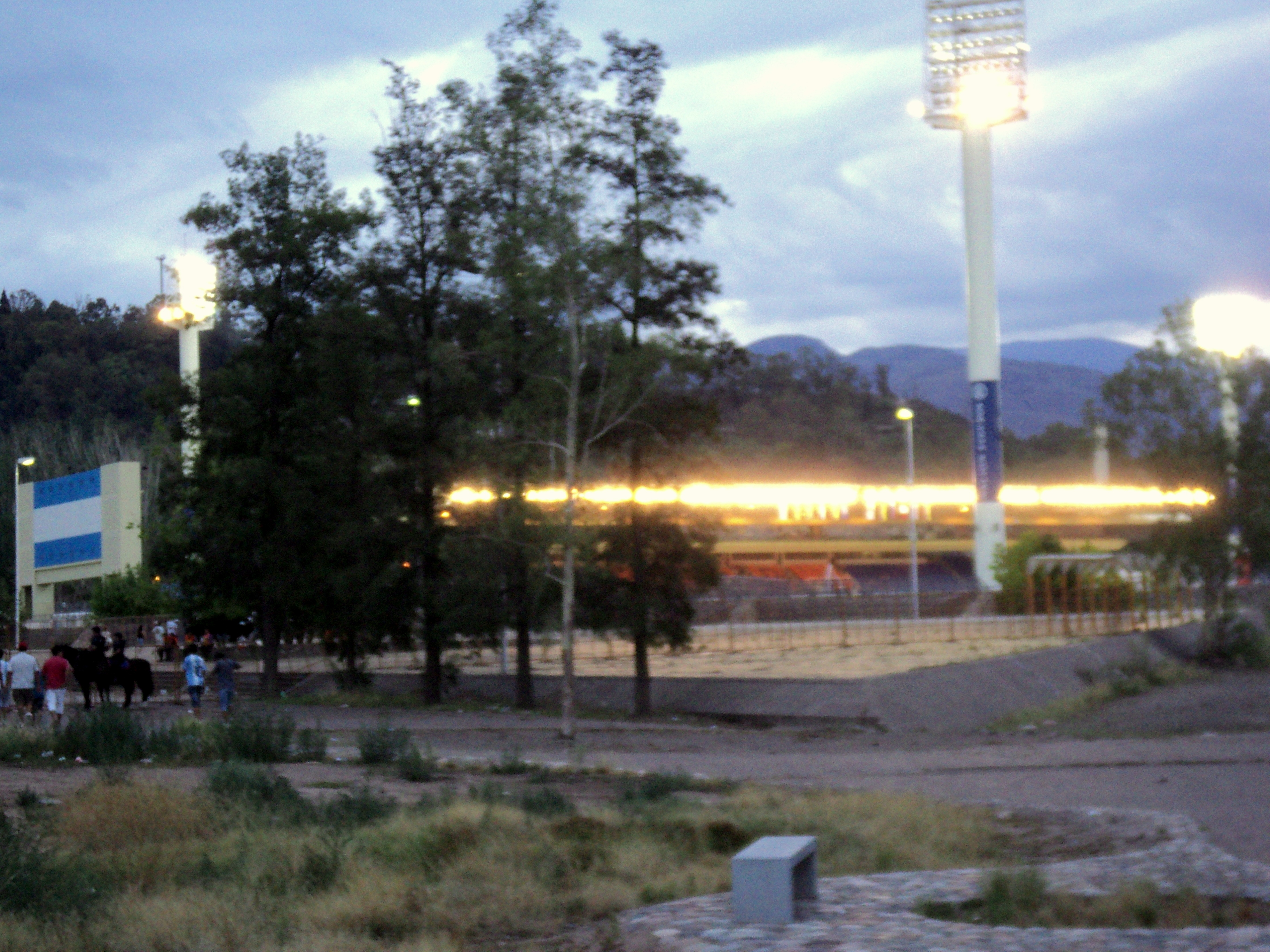 division de la facultade cs economicas